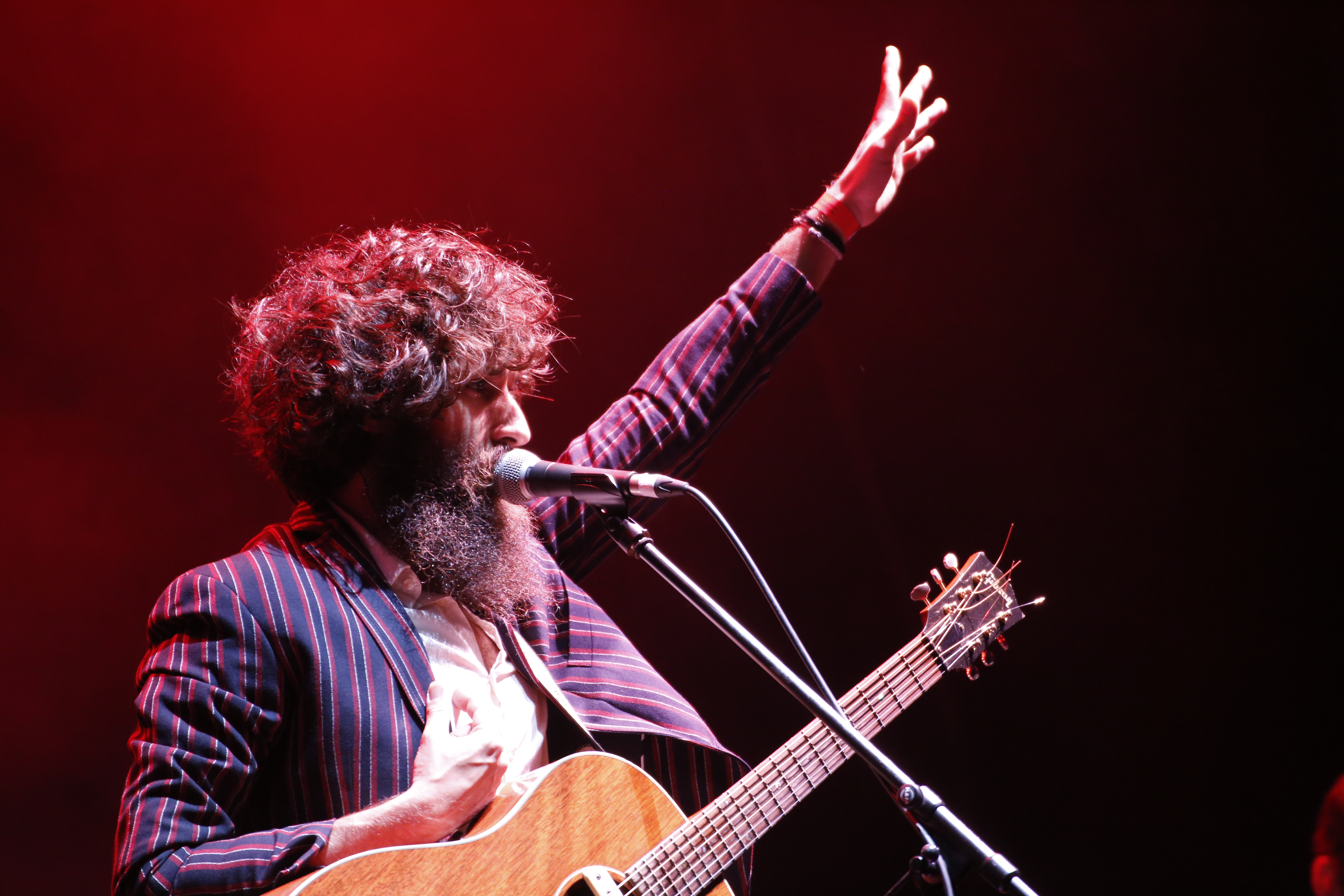 Actuación de Ángel Stanich en el festival Palencia Sonora 2018.